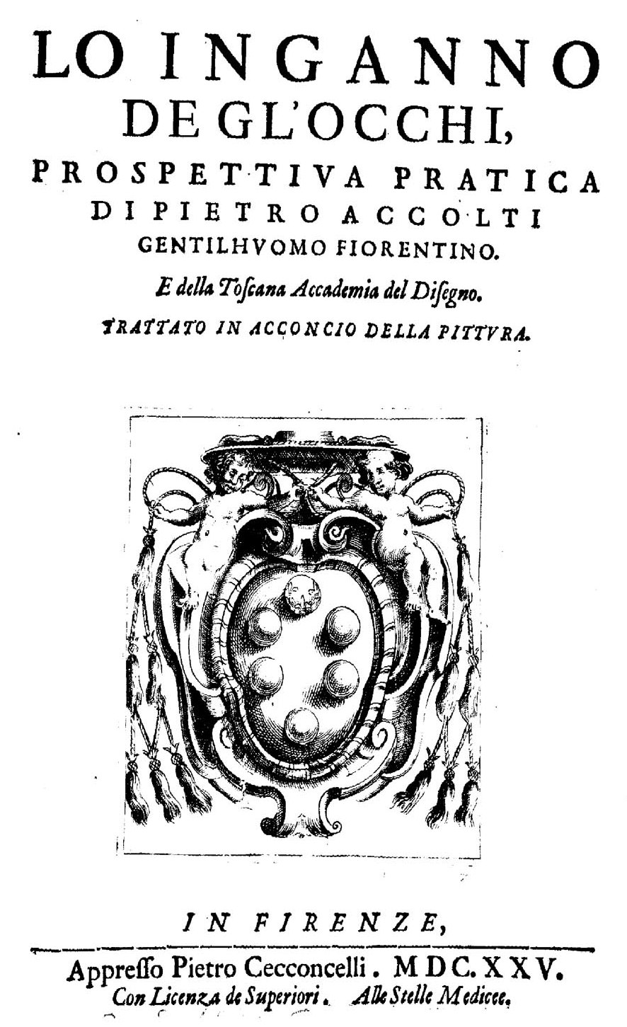 Lo inganno de gl'occhi, prospettiua pratica di Pietro Accolti ... Trattato in acconcio della pittura. - In Firenze : Appresso Pietro Cecconcelli, Alle Stelle Medicee, 1625. - [12], 152, [4] p. : ill. ; 2° .